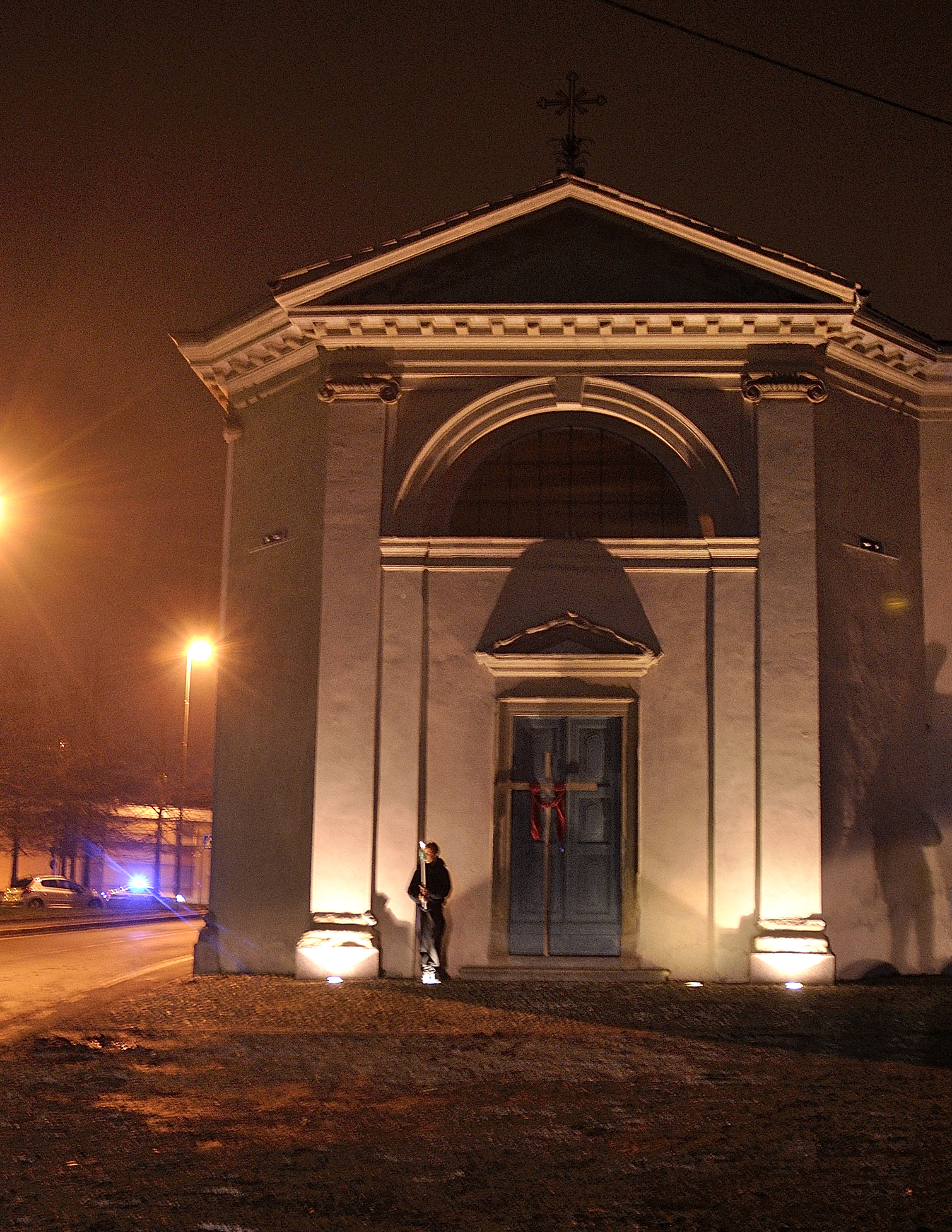 La chiesetta di San Francesco a Mariano Comense